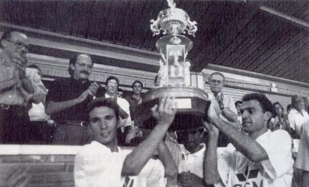 El Albacete Balompié levantando el trofeo de 1994.